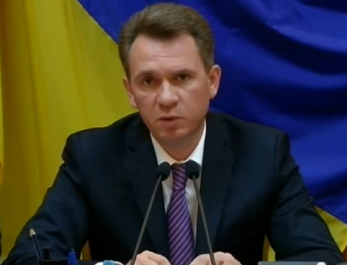 Михайло Охендовський, Голова Центральної виборчої комісії України.